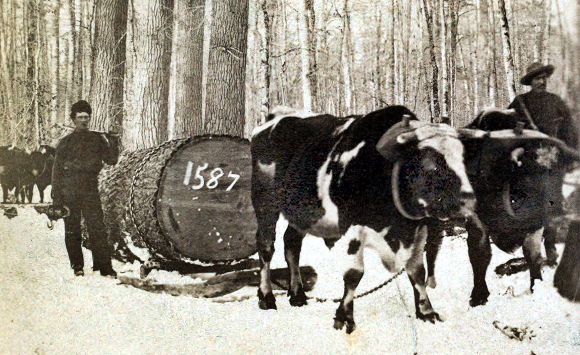 Cette image est extraite d'une carte cartonnée destinée à être regardée dans un appareil stéréoscopique pour donner une illusion de relief. C'est l'image de gauche